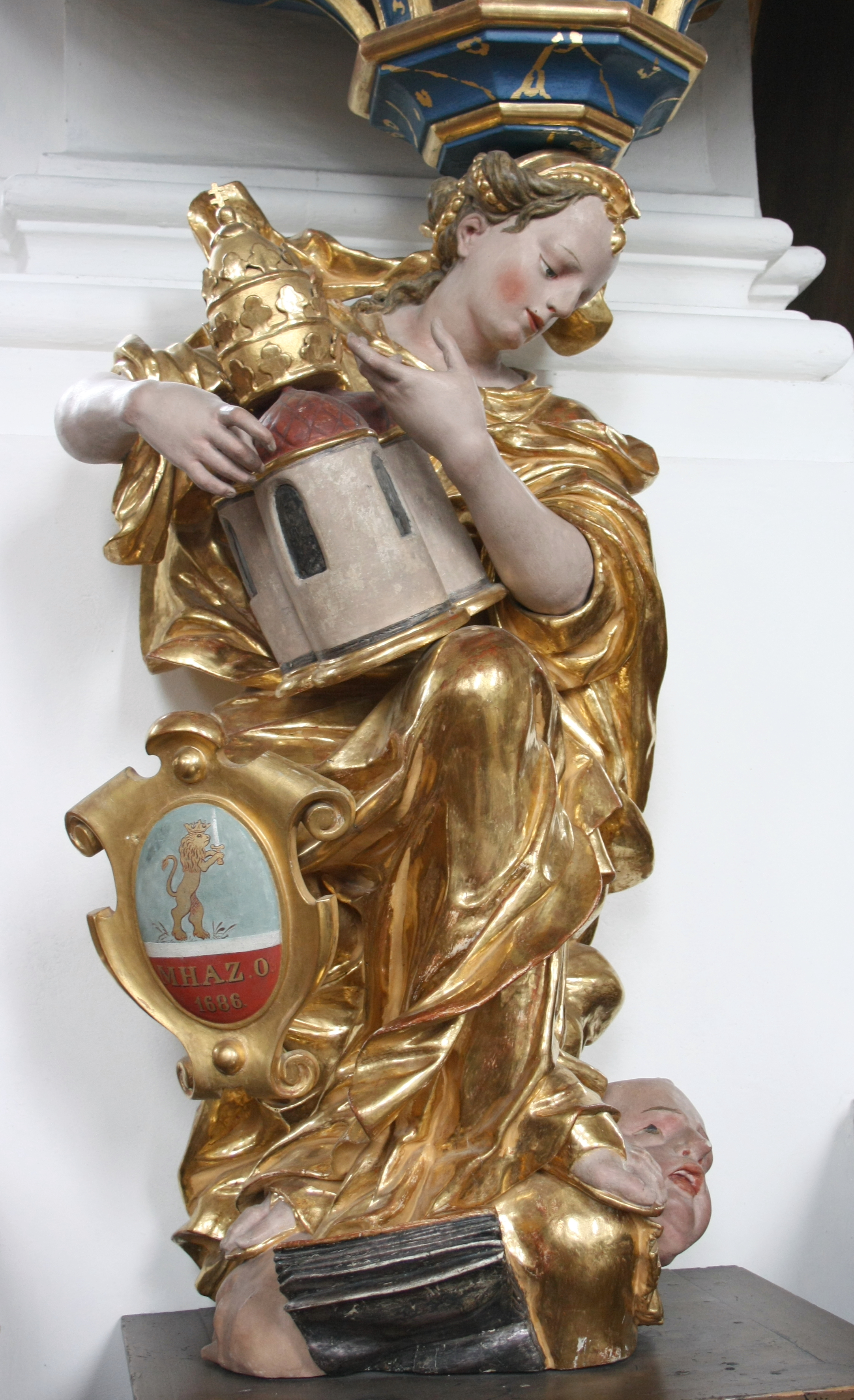 Pfarr- und Wallfahrtskirche St. Michael in Violau (Altenmünster), Kanzel von 1686, am Fuß Allegorie der Kirche mit den Symbolen der Rechtgläubigkeit und des Sieges über Unglauben und Irrlehre, mit dem Wappen der Äbtissin Hildegard Meitzner und der Inschrift: „MHAZO“ (Maria Hildegardis Äbtissin zu Oberschönefeld), s. Michael Kreuzer: Wallfahrtskirche Violau. Hgg. vom Kath. Pfarramt St. Michael, Altenmünster o. J.